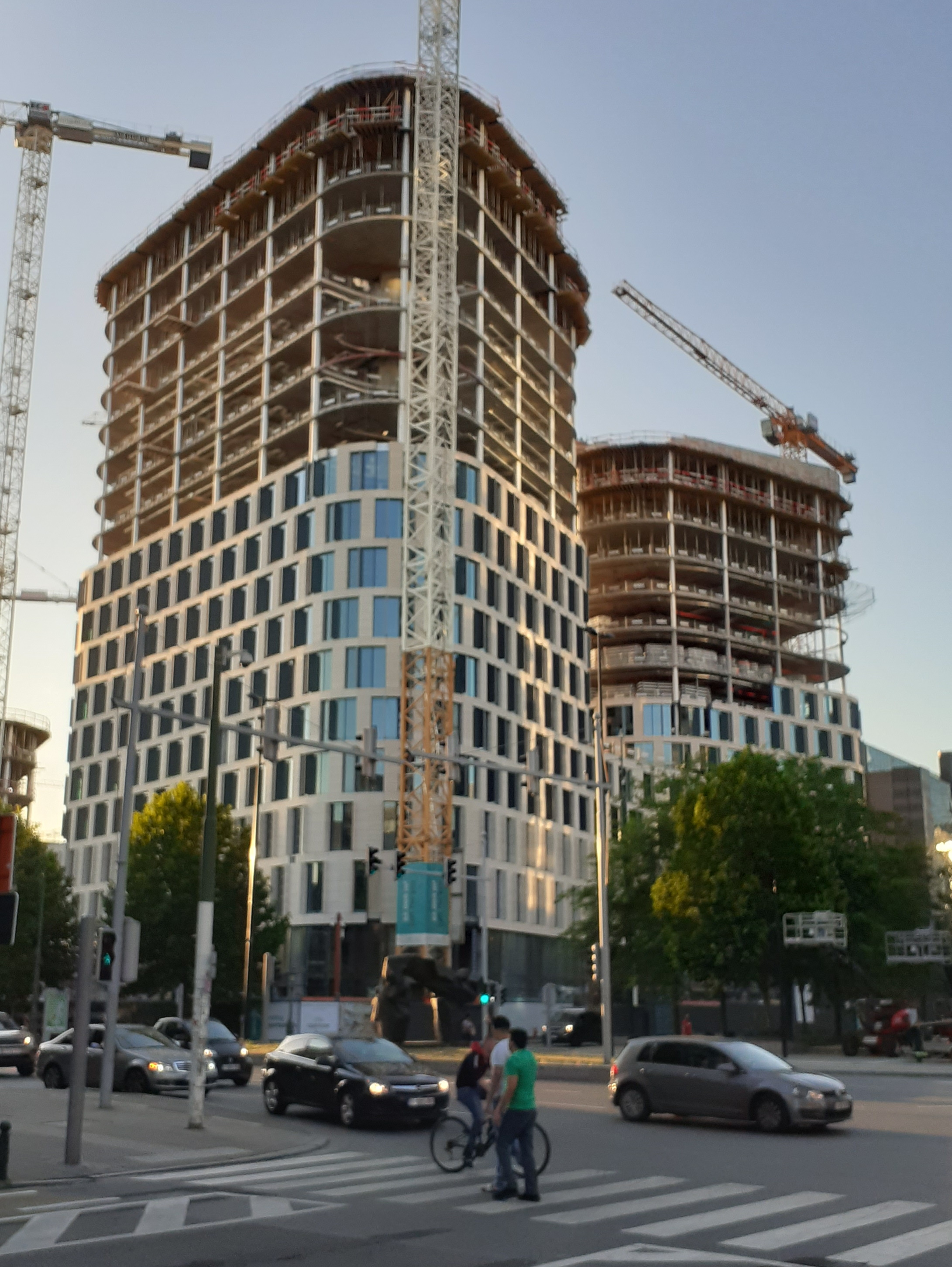 Quatuor-torens in Brussel juni 2020